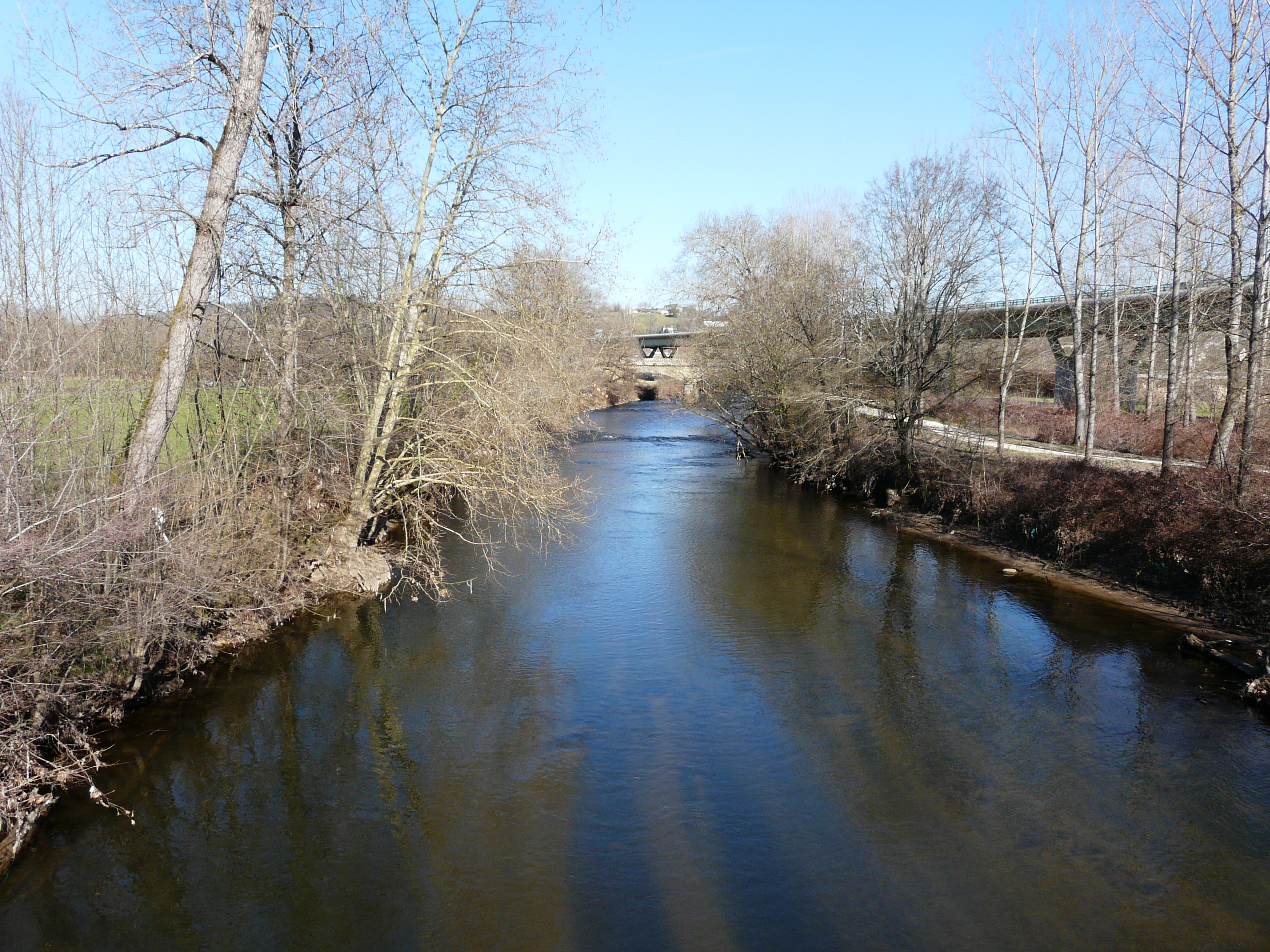 En amont de la route départementale 69, la Corrèze marque la limite entre Ussac (à gauche) et Saint-Pantaléon-de-Larche (en rive opposée), Corrèze France. Sur la droite, le viaduc Vézère-Corrèze de l'autoroute A89.